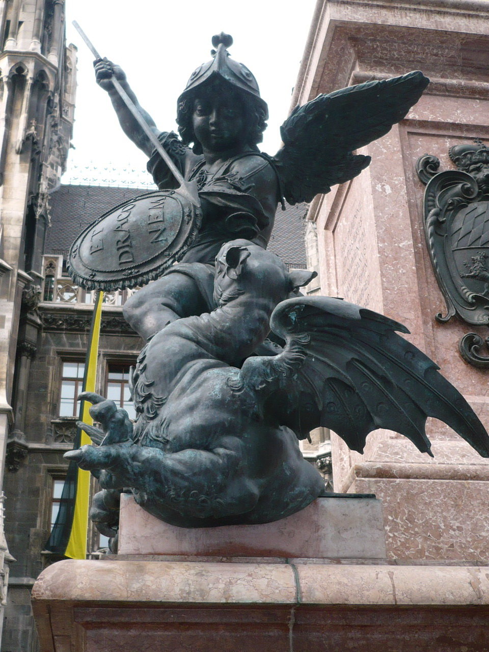 Eines der vier Fabeltiere der Mariensäule in München. Hier der Drache, der den Hunger verkörpert. Die Eckpositionen des Säulenaufbaus wurden 1641 mit vier sieghaften, mit antiken Panzern gerüsteten Putti besetzt. Sie kämpfen gegen die Hauptübel, denen die Menschen zur Zeit des Dreißigjährigen Krieges ausgesetzt waren: Unglaube (Schlange, Inschrift: SUPER ASPIDEM), Pest (Basilisk, ET BASILISCUM), Krieg (Löwe, ET LEONEM) und Hunger (Drache, ET DRACONEM). Die auf den Putti-Schilden zu lesenden Worte beziehen sich auf Maria: „SUPER ASPIDEM ET BASILISCUM [ambulabis] ET LEONEM ET DRACONEM [conculcabis]“ („Über die Schlange und den Basilisken wirst Du gehen und den Löwen und den Drachen wirst Du zertreten“; Psalm 91, Vers 13).